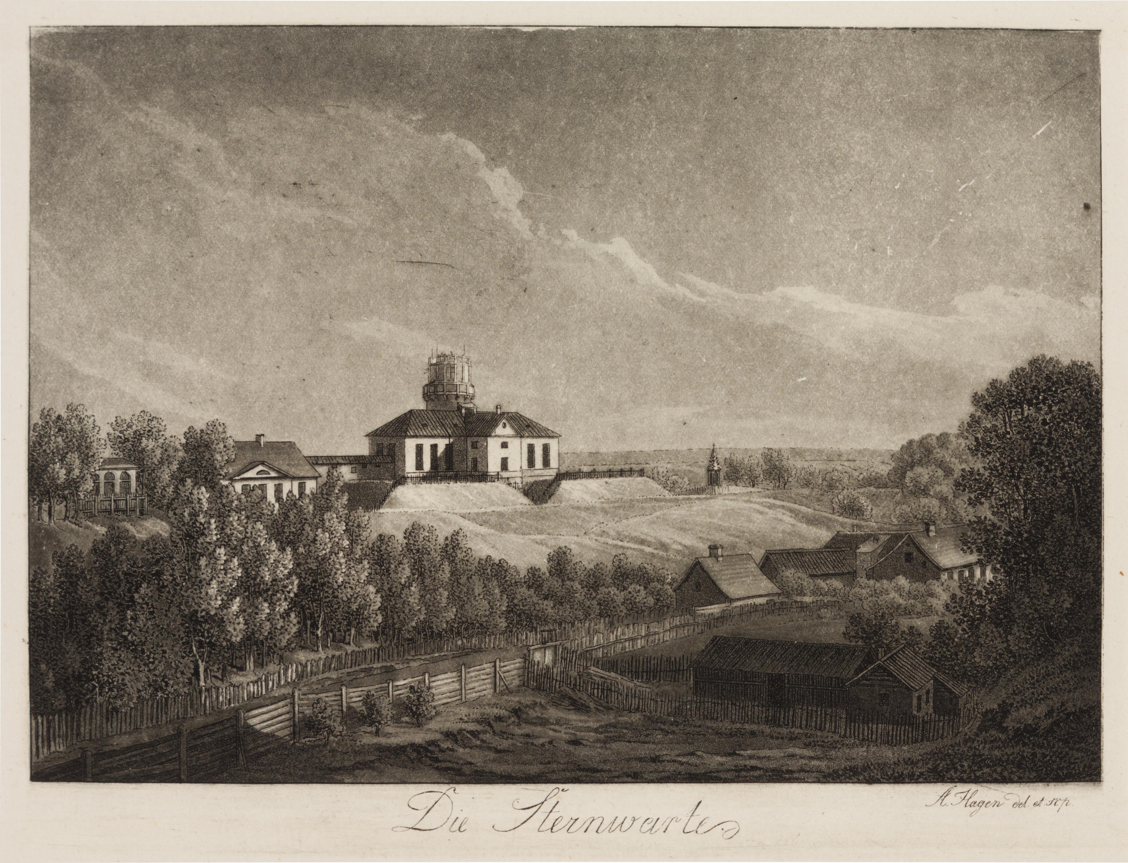 "Tartu tähetorn" (ca 1827–1833). Ofort ja akvatinta paberil. Kujutise kõrgus 15,0 ja laius 21,3 cm; lehe kõrgus 32,1 ja laius 40,4 cm. This image on crowdsourcing geotagging platform Ajapaik MUIS:TKM TR 3972 G 1214